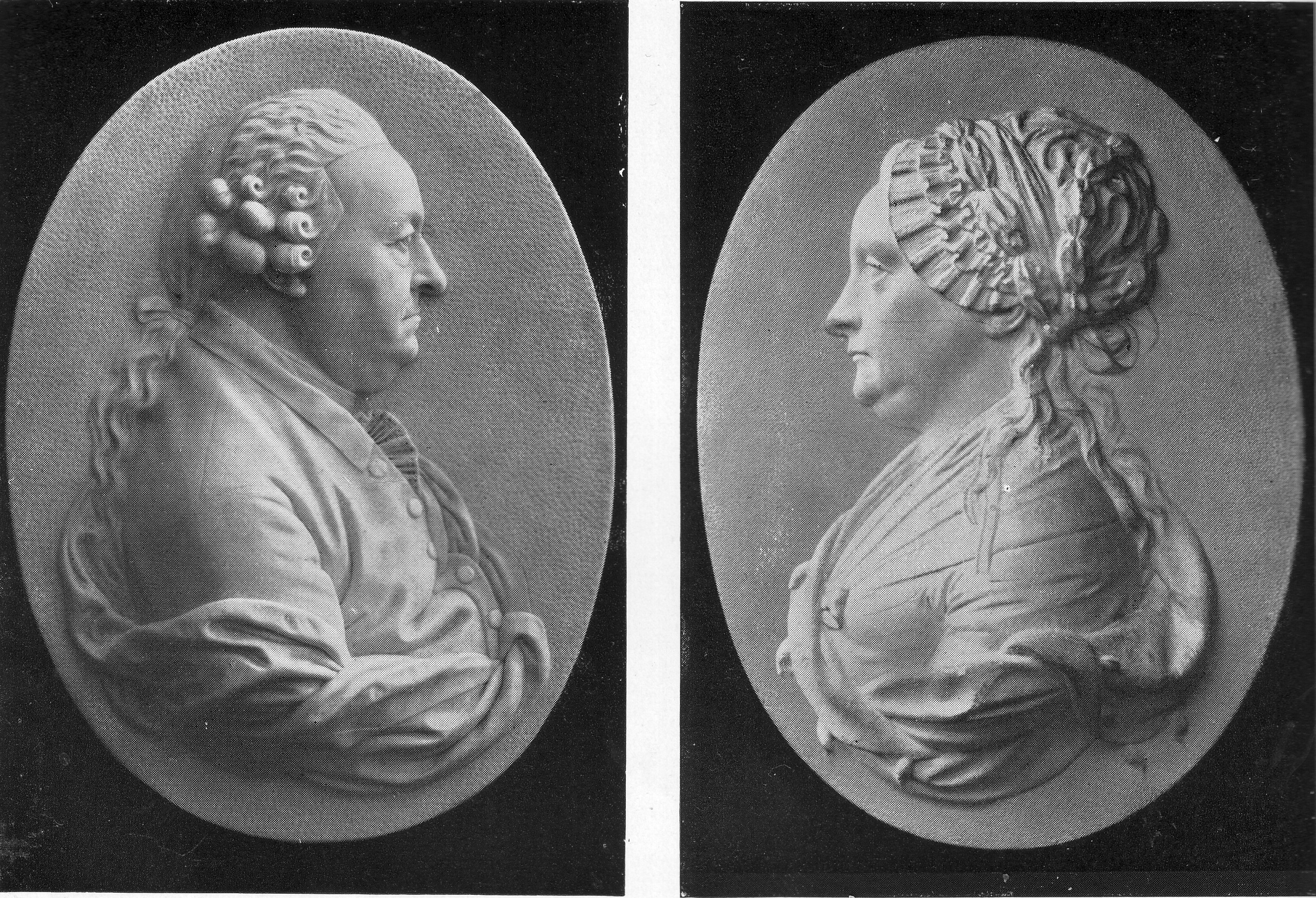 Johann Caspar Goethe und seine Ehefrau